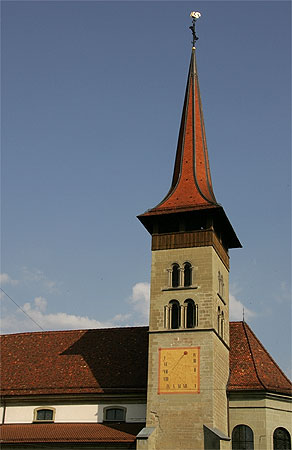 Fribourg / Freiburg: Notre-Dame